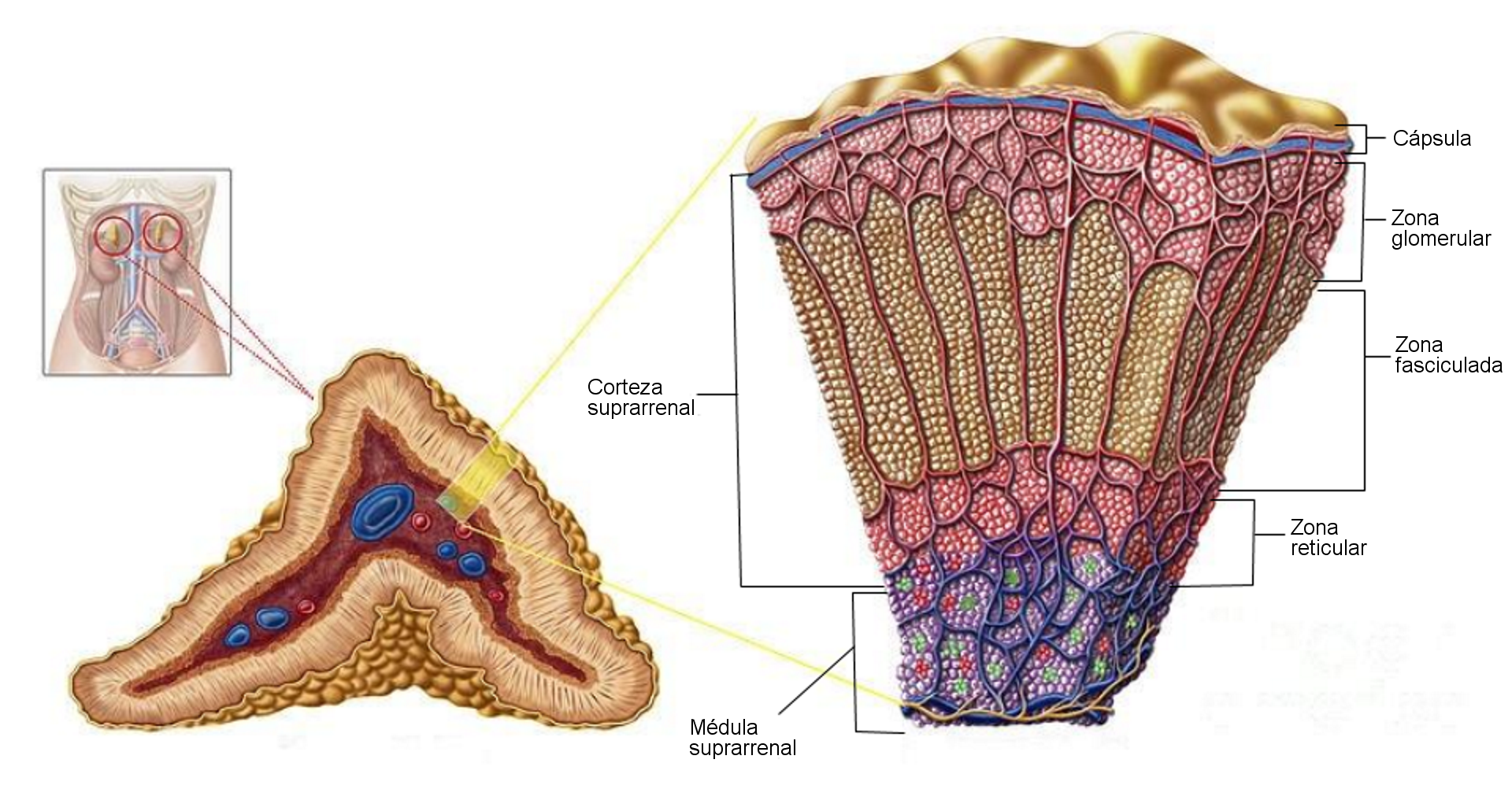 Esquema en el que se representa la glándula suprarrenal y las diferentes partes que la componen.